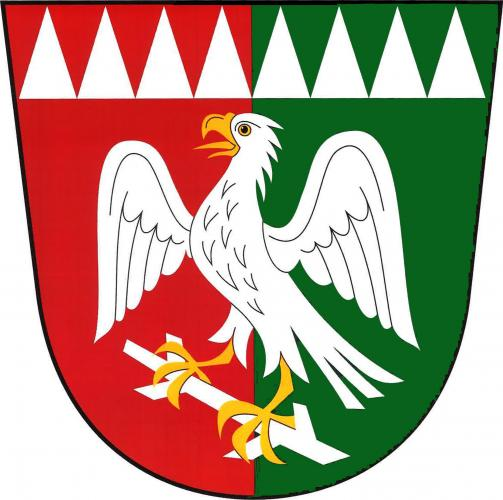 Otín, okres Jihlava,znak